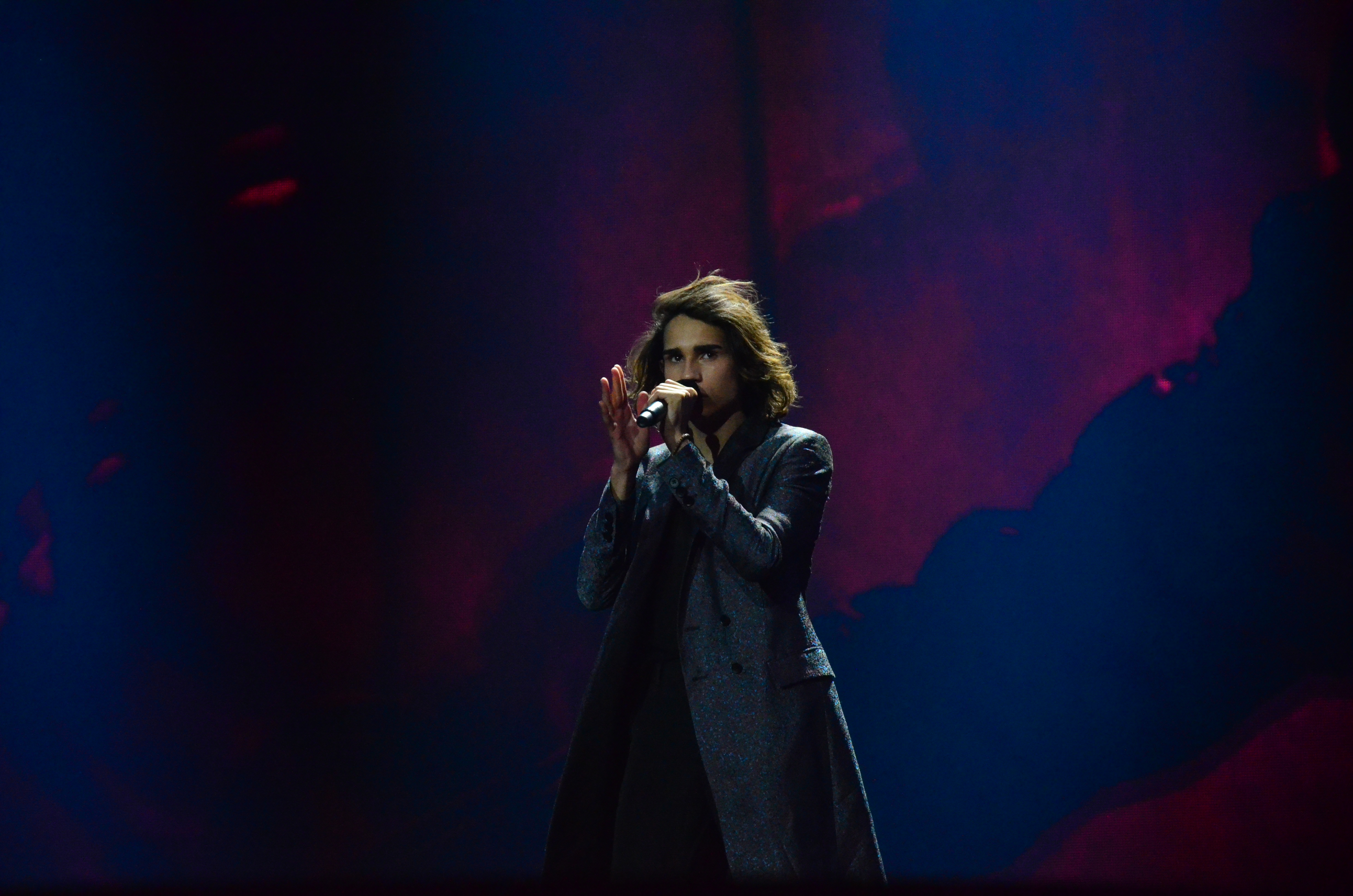 12 травня. Генеральна репетиція фіналу Євробачення 2017. IMRI (Israel)